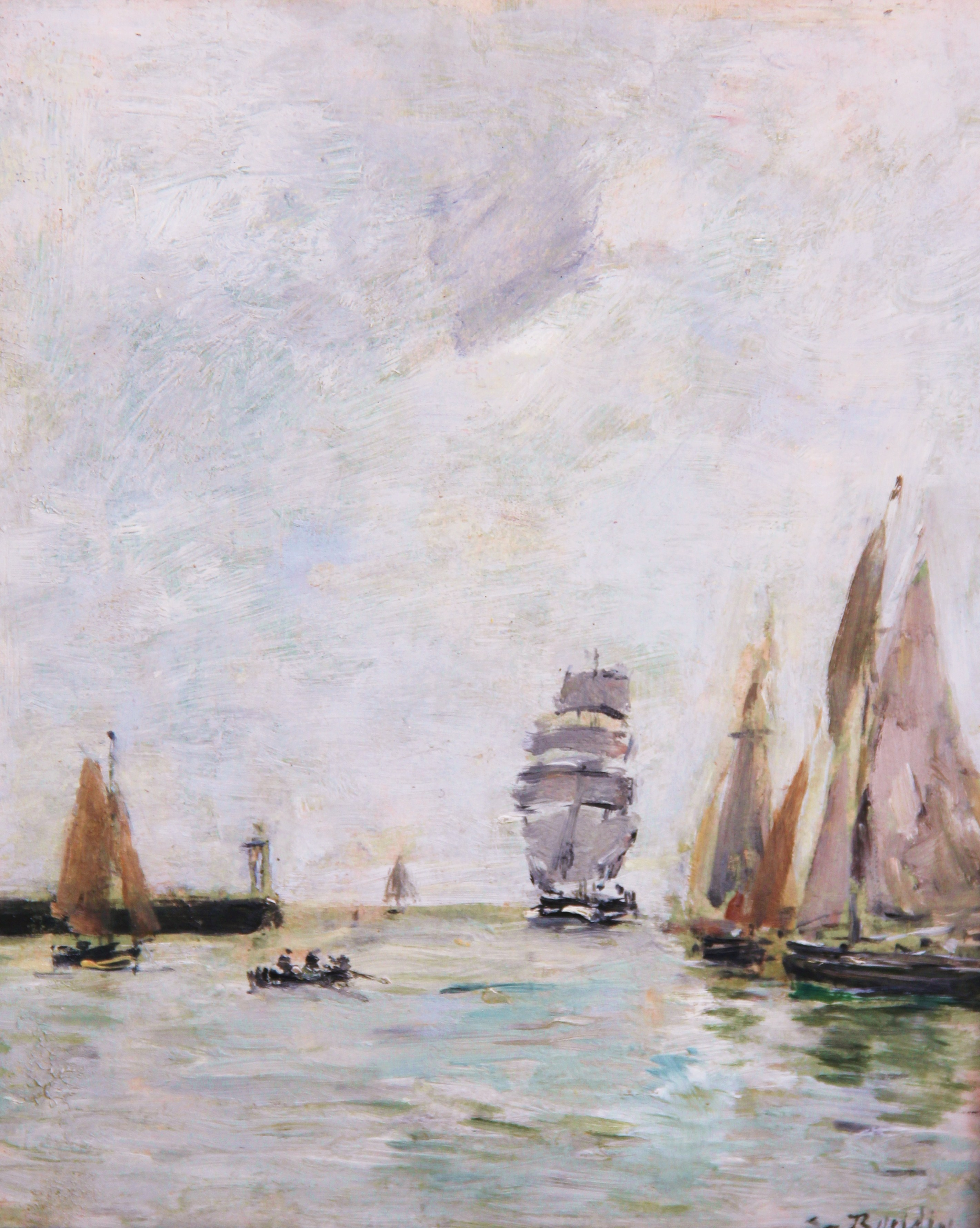 Huile sur panneau, 27 cm x 22 cm Signé en bas à droite. Vers 1888 / 1895 collection privée